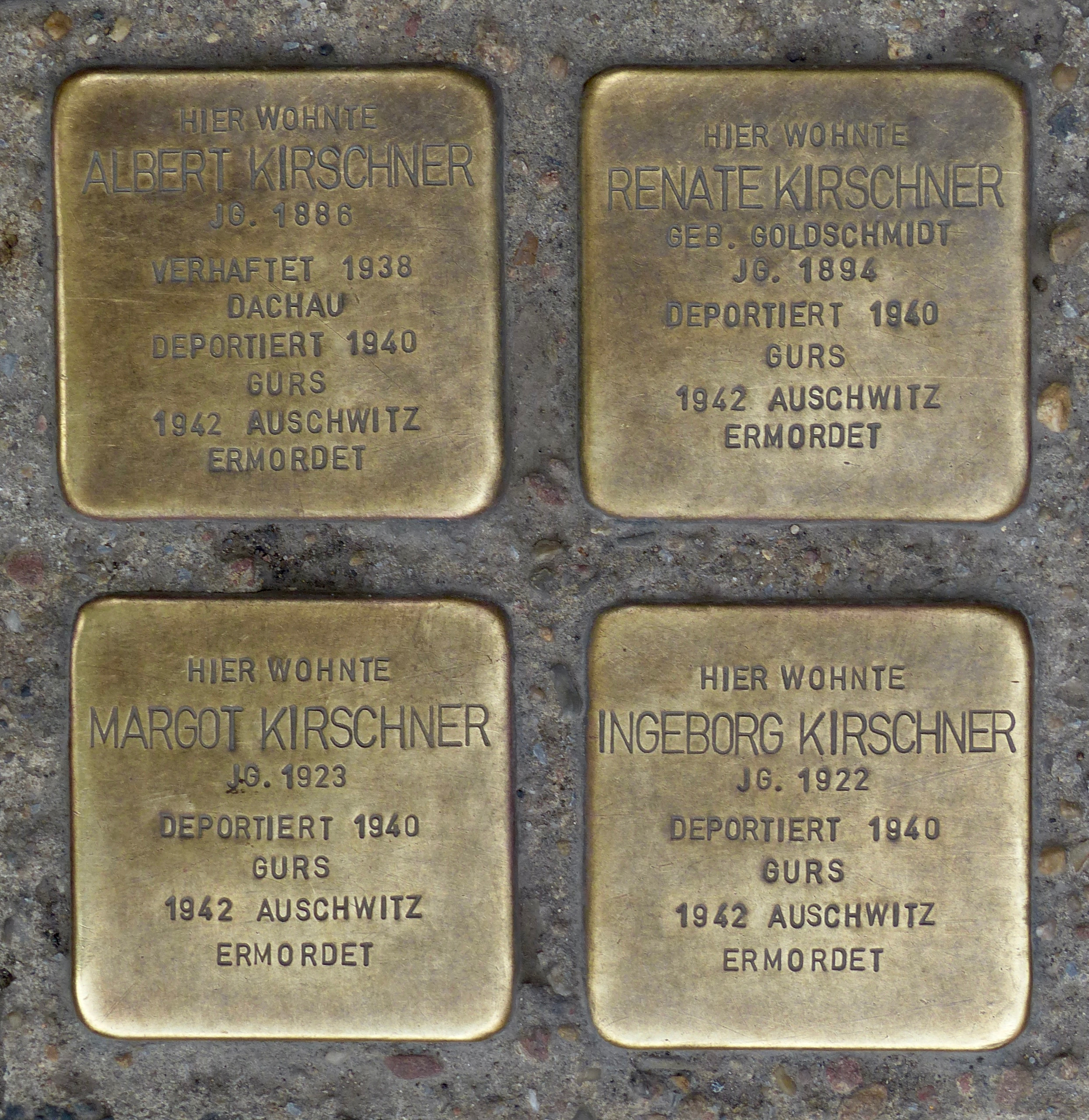 Stolpersteine Würzburg: Stolperstein für Albert, Renate, Ingeborg und Margot Kirschner, Verlegestelle Veitshöchheimerstrasse 1a